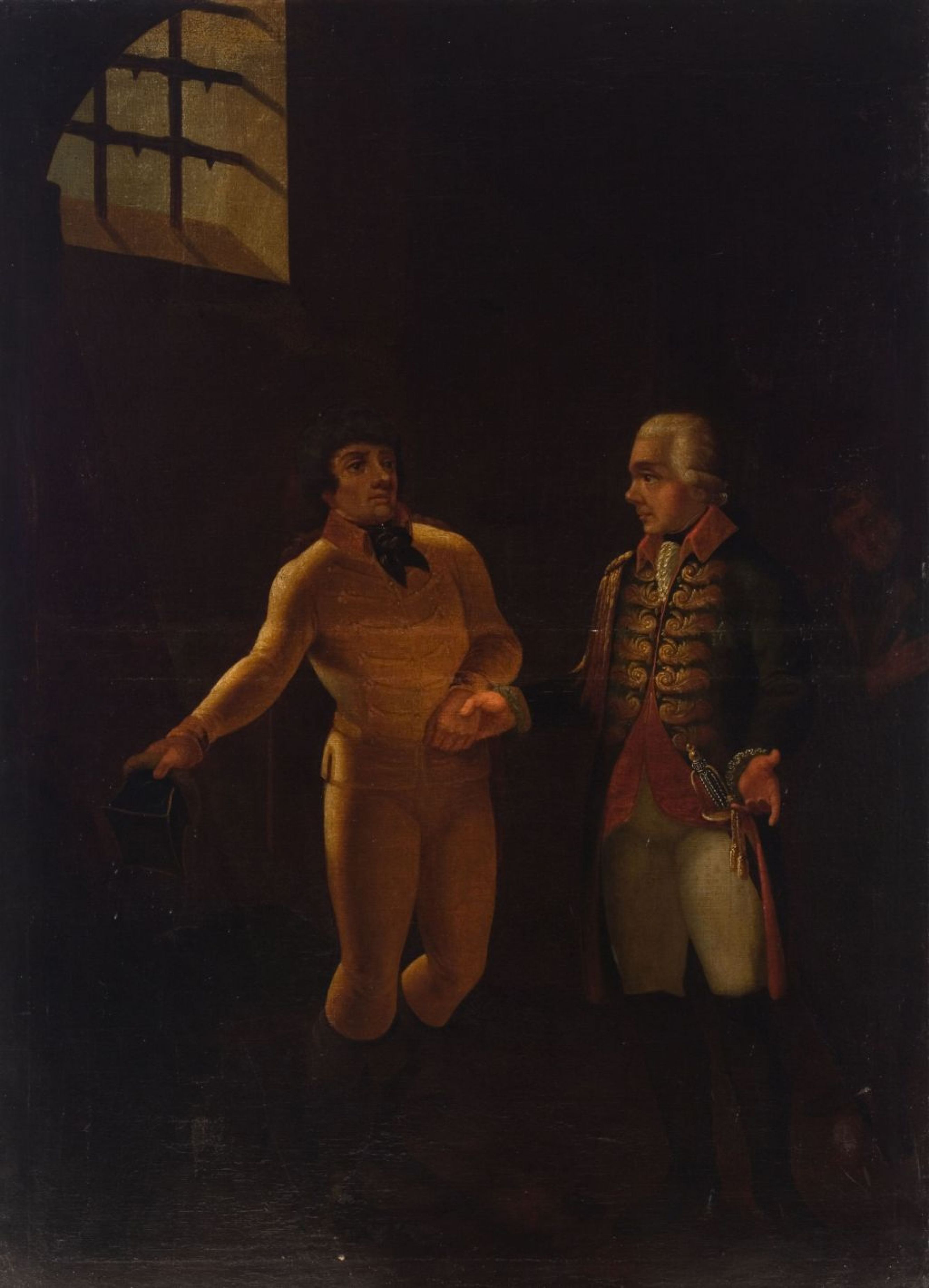 Беларуская (тарашкевіца): Тадэвуш Касьцюшка (Tadevuš Kaściuška) у Петрапаўлаўскай крэпасьці